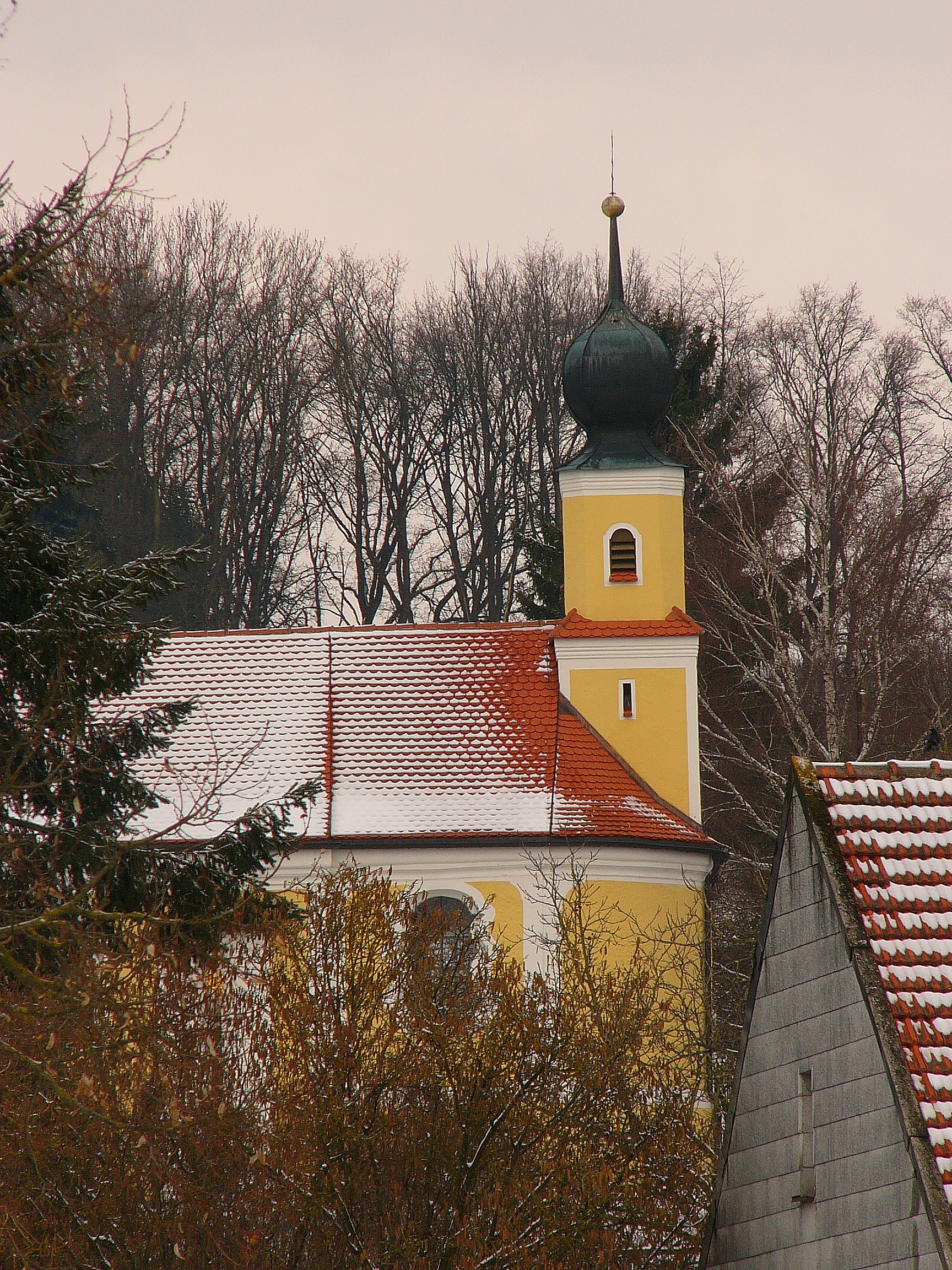 Kirche St. Salvator; 17./18. Jahrhundert; mit Ausstattung.This is a photograph of an architectural monument.